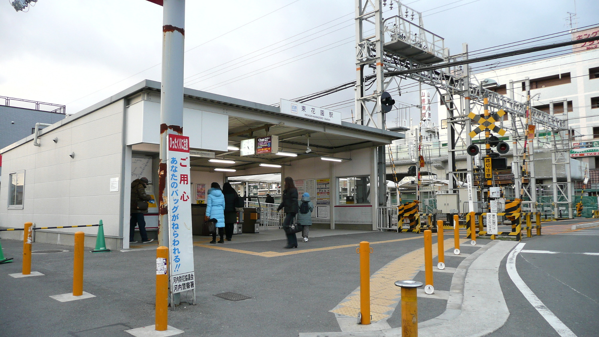 Kinki Nippon Railway,Nara Line,Higashi-Hanazono Station. /連続立体交差化工事中の近鉄奈良線駅東花園駅南口駅舎